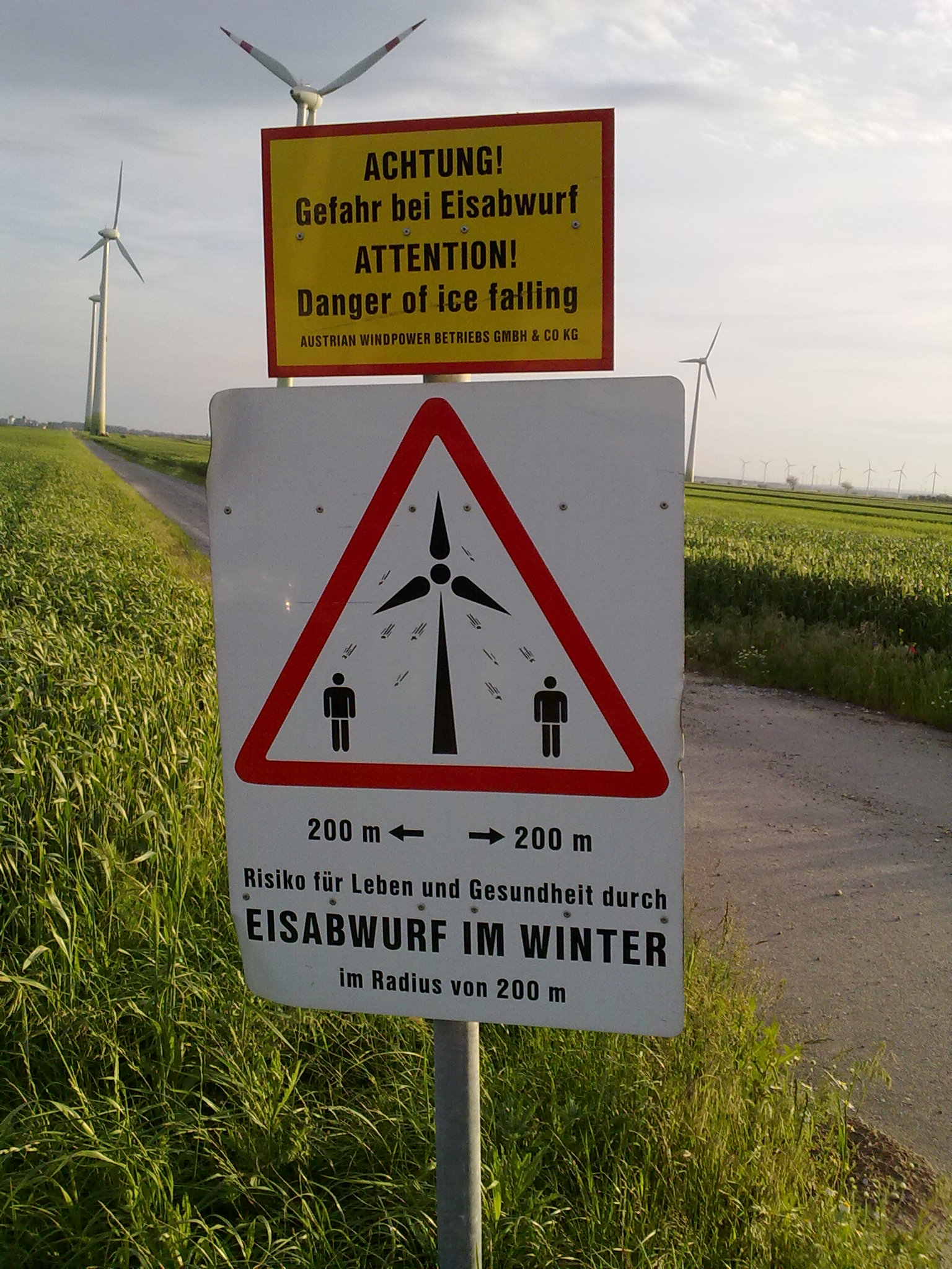 "ACHTUNG! Gefahr bei Eisabwurf / ATTENTION! Danger of ice falling || Risiko für Leben und Gesundheit durch EISABWURF IM WINTER im Radius von 200 m" - Schild im Burgenland (sign in Burgenland)